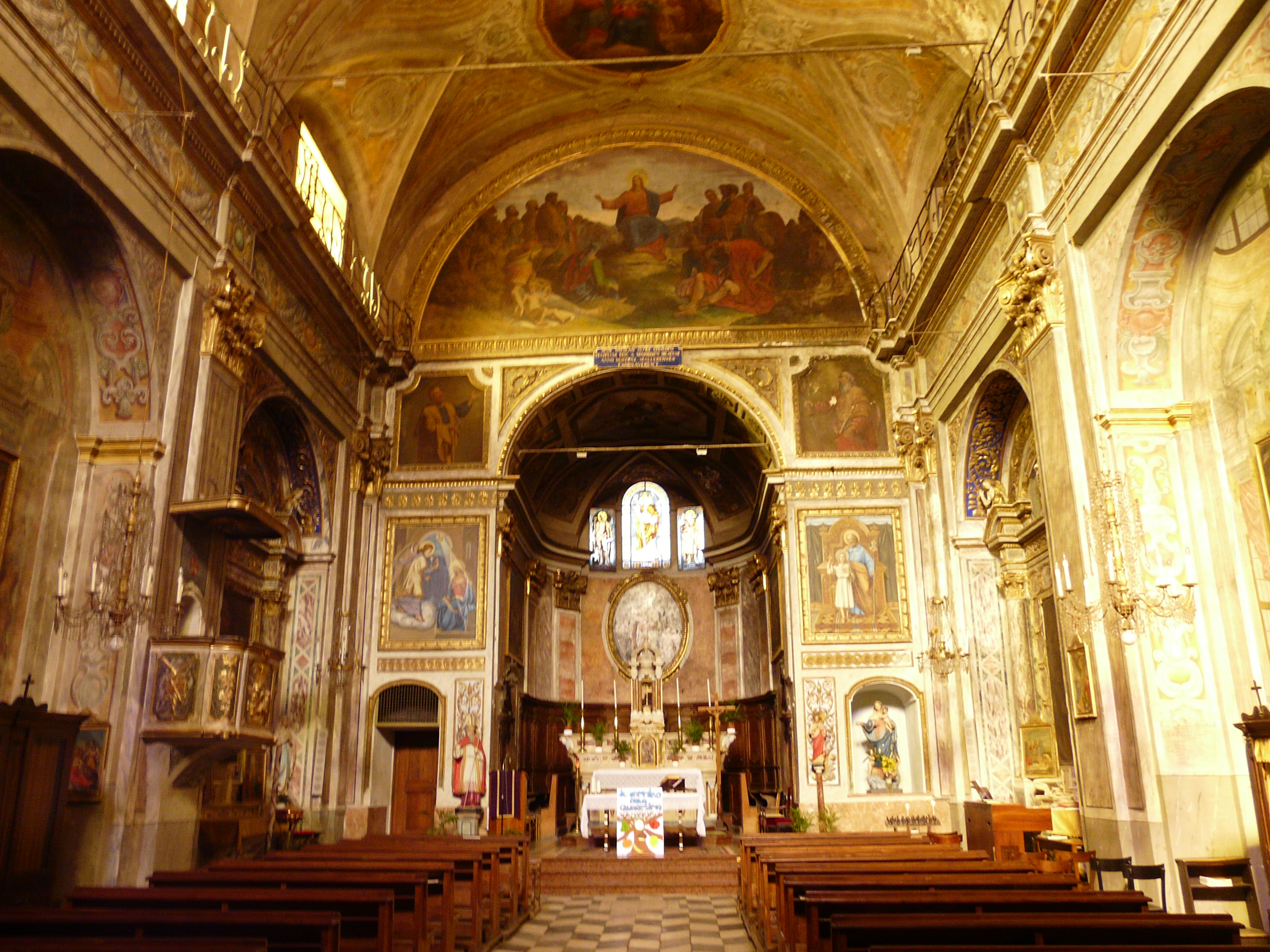 Chiesa di San Nicola, Mallare, Liguria, Italia